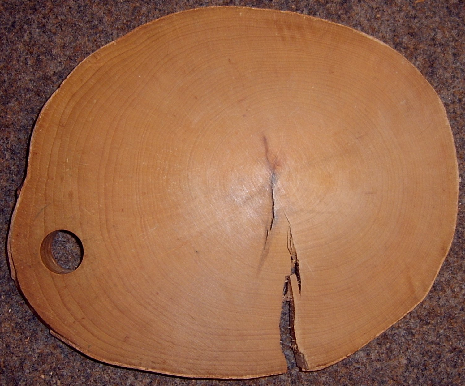 Foto taken by Lumbar 16:29, 6 November 2005 (UTC) in Osnabrück